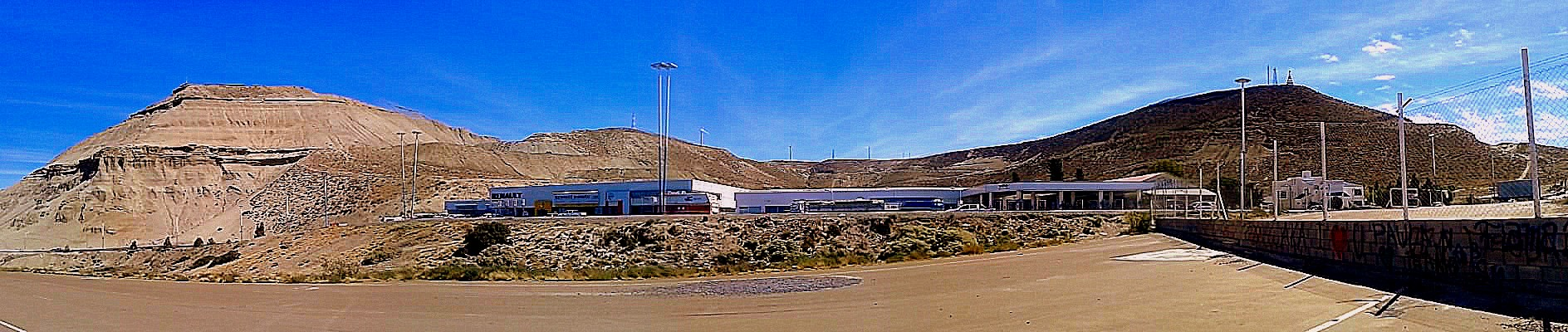 el parque Antoni moran en lo alto de los cerros Viteaux y Chenque